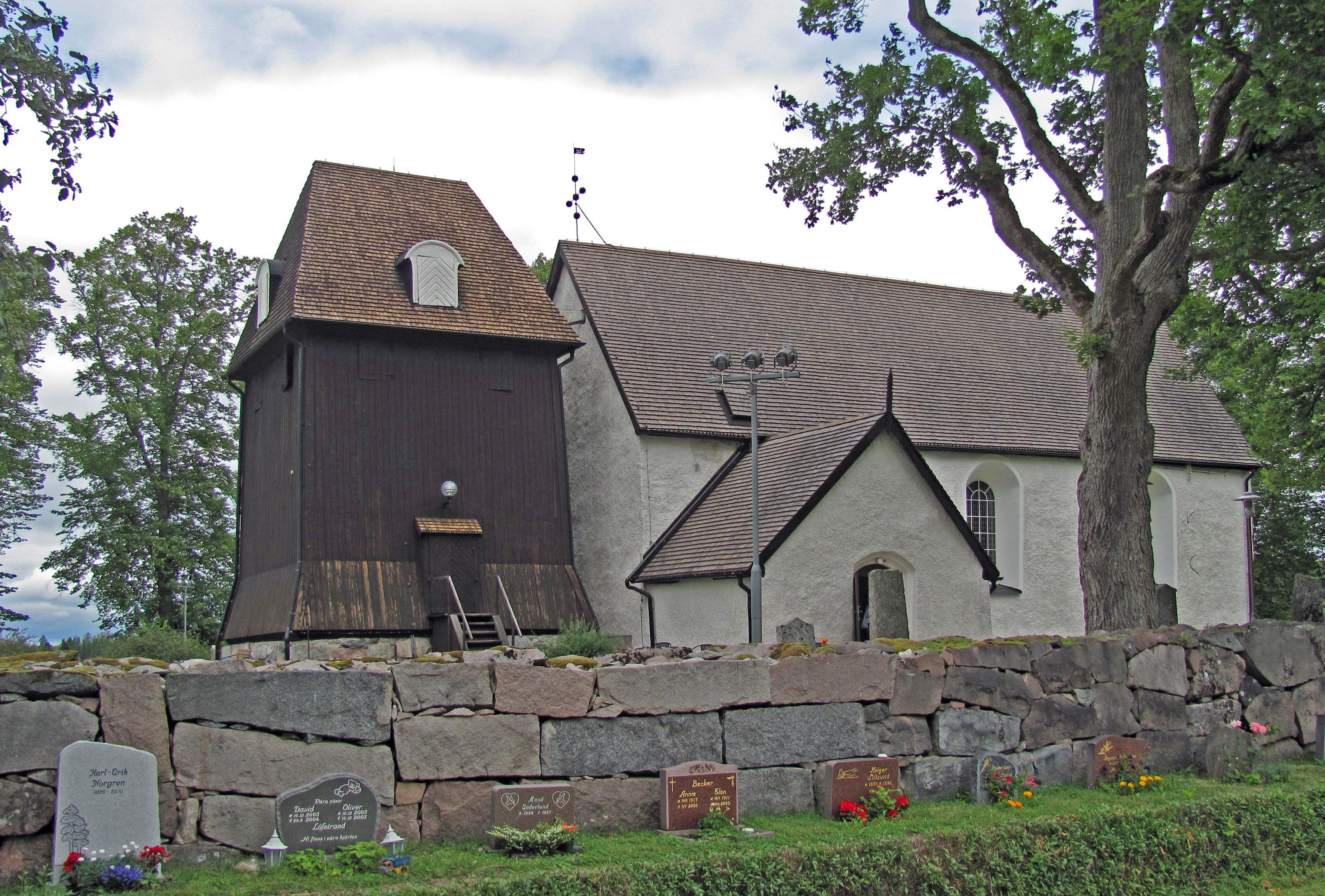 Säby kyrka, Västmanland